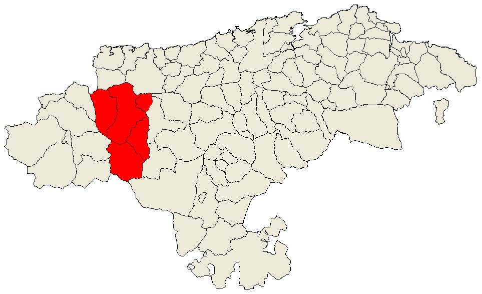 Mapa de los municipios de la Comunidad Autónoma de Cantabria (España) en el que se muestra en color rojo aquellos municipios pertenecientes a la comarca del Valle del Nansa: Lamasón, Rionansa, Tudanca, Polaciones y parte de Cabuérniga.